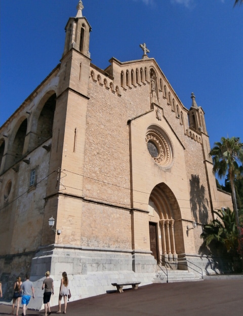 Pfarrkirche Arta